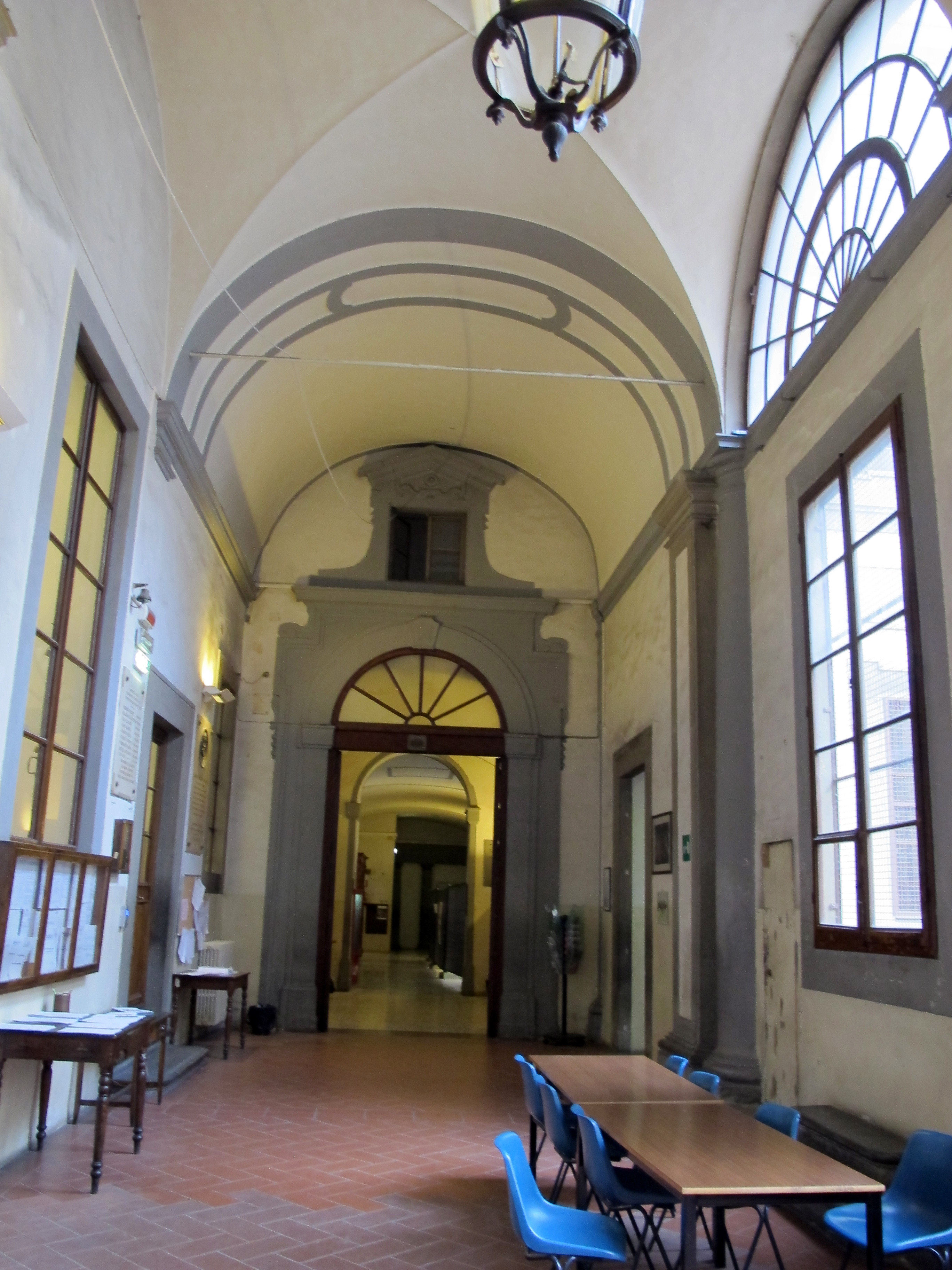 Palazzo Martelli (Scolopi), Firenze